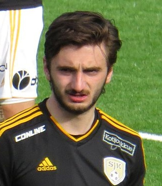 Bahrudin Atajić, bosniahertsegovinalainen jalkapalloilija Seinäjoen Jalkapallokerhon joukkueessa kaudella 2015.